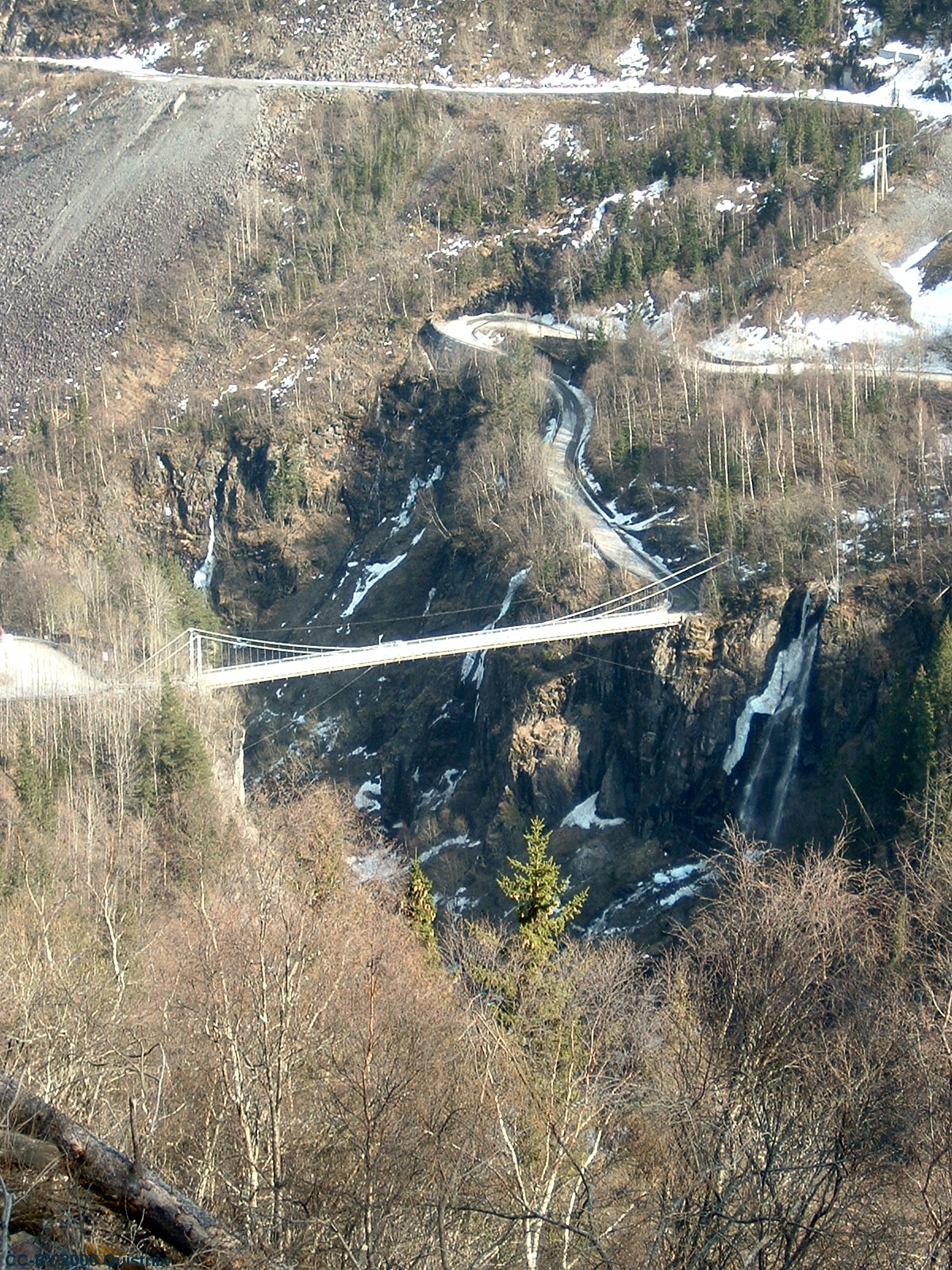 Hangbrug naar de Vemork-fabriek te Rjukan (Noorwegen), mei 2006. Eigen werk.